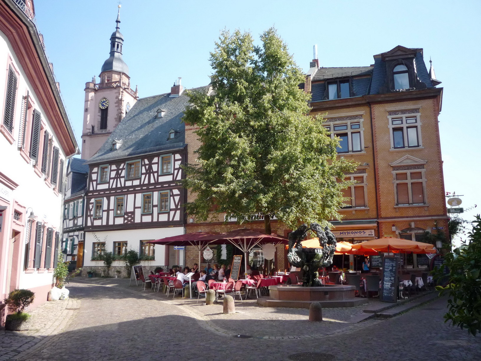 gemütliche Altstadt von Eltville